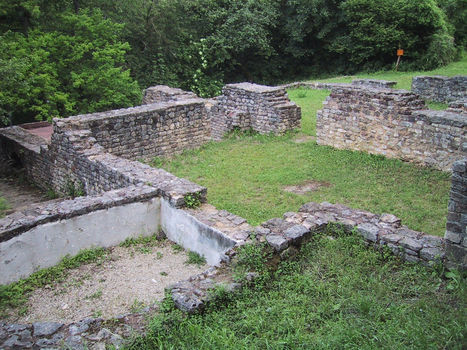 Ruine des römischen Quellheiligtums in Ihn